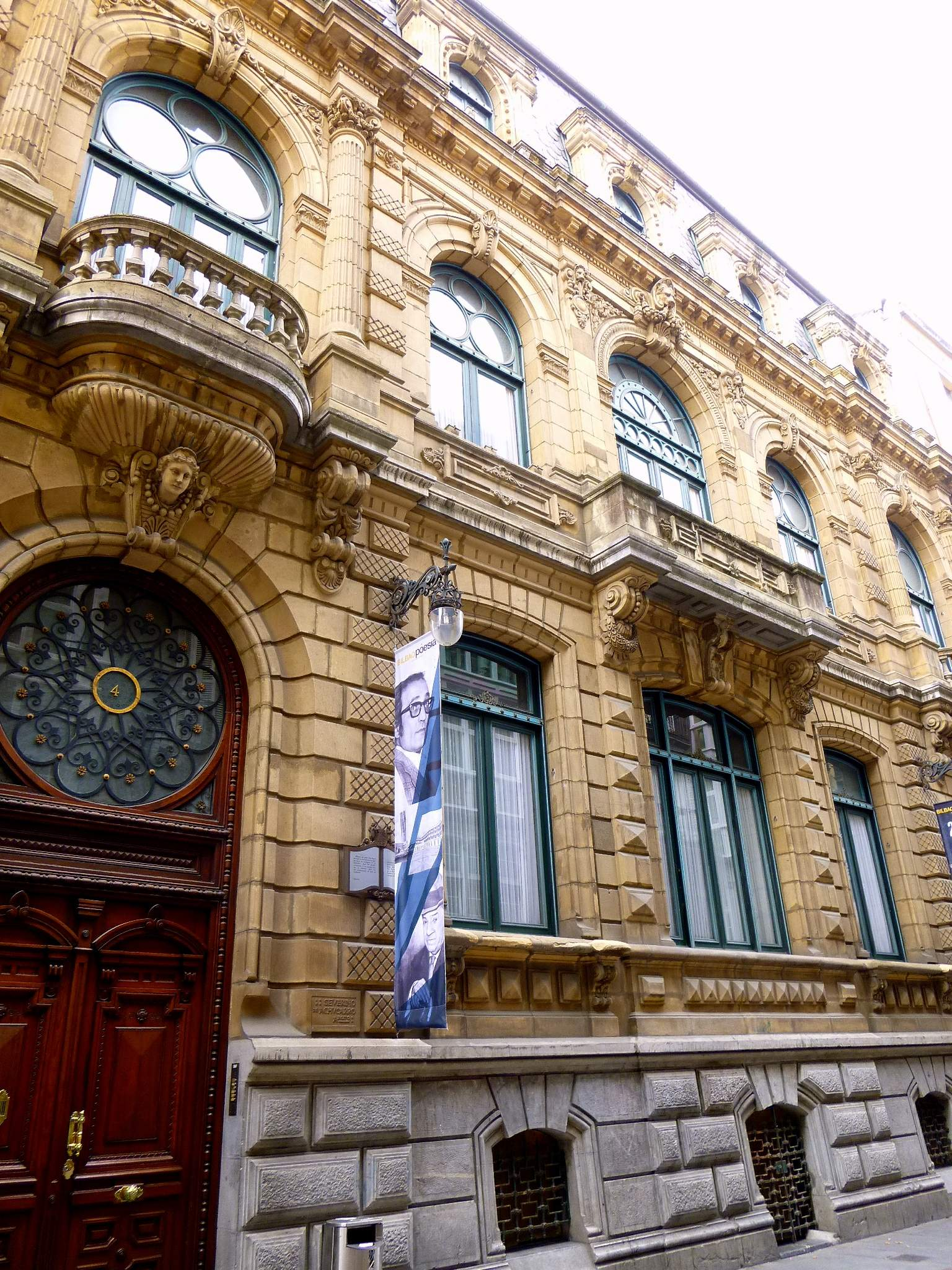 Biblioteca Municipal de Bidebarrieta (Bilbao)